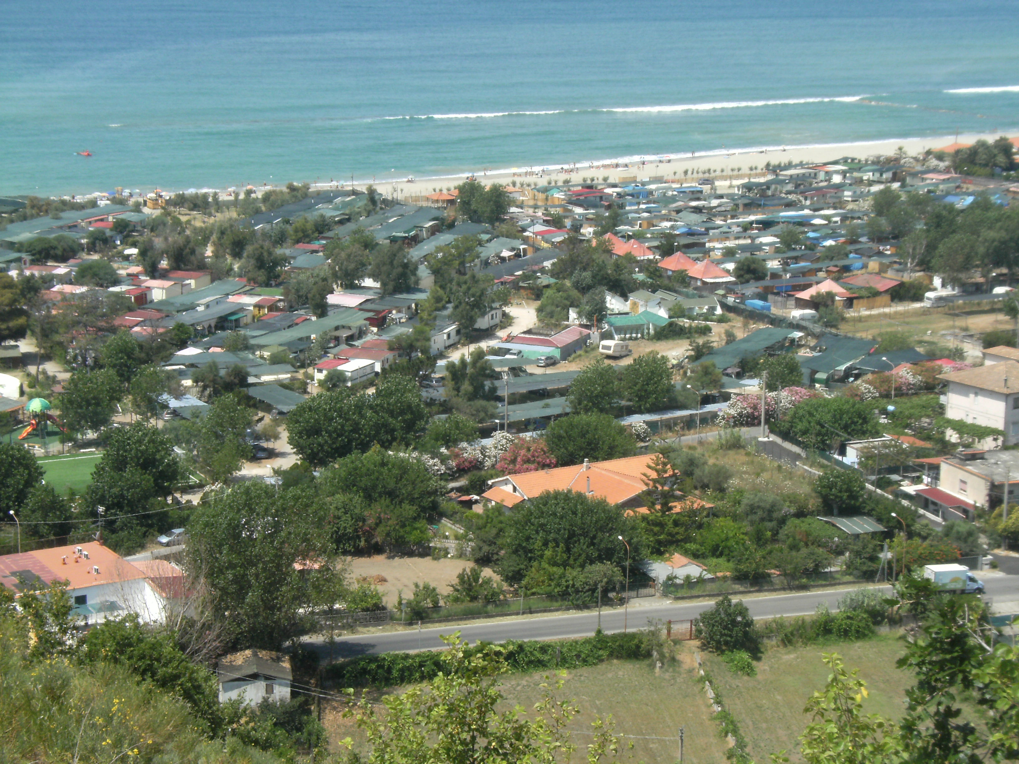 Panorama di Ascea Marina